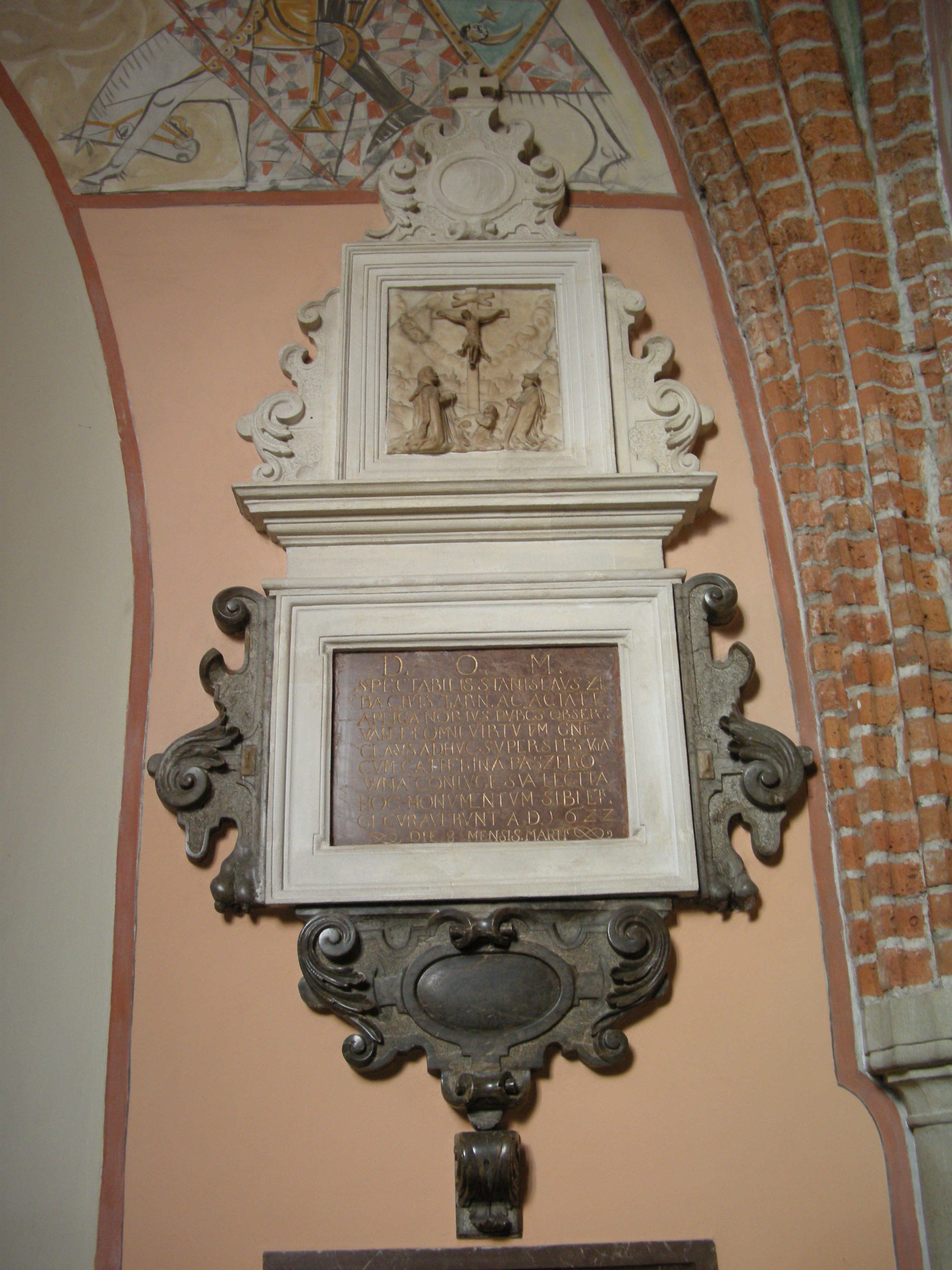 Epitafium Ziębów z początku XVII w. z najstarszą panoramą Tarnowa